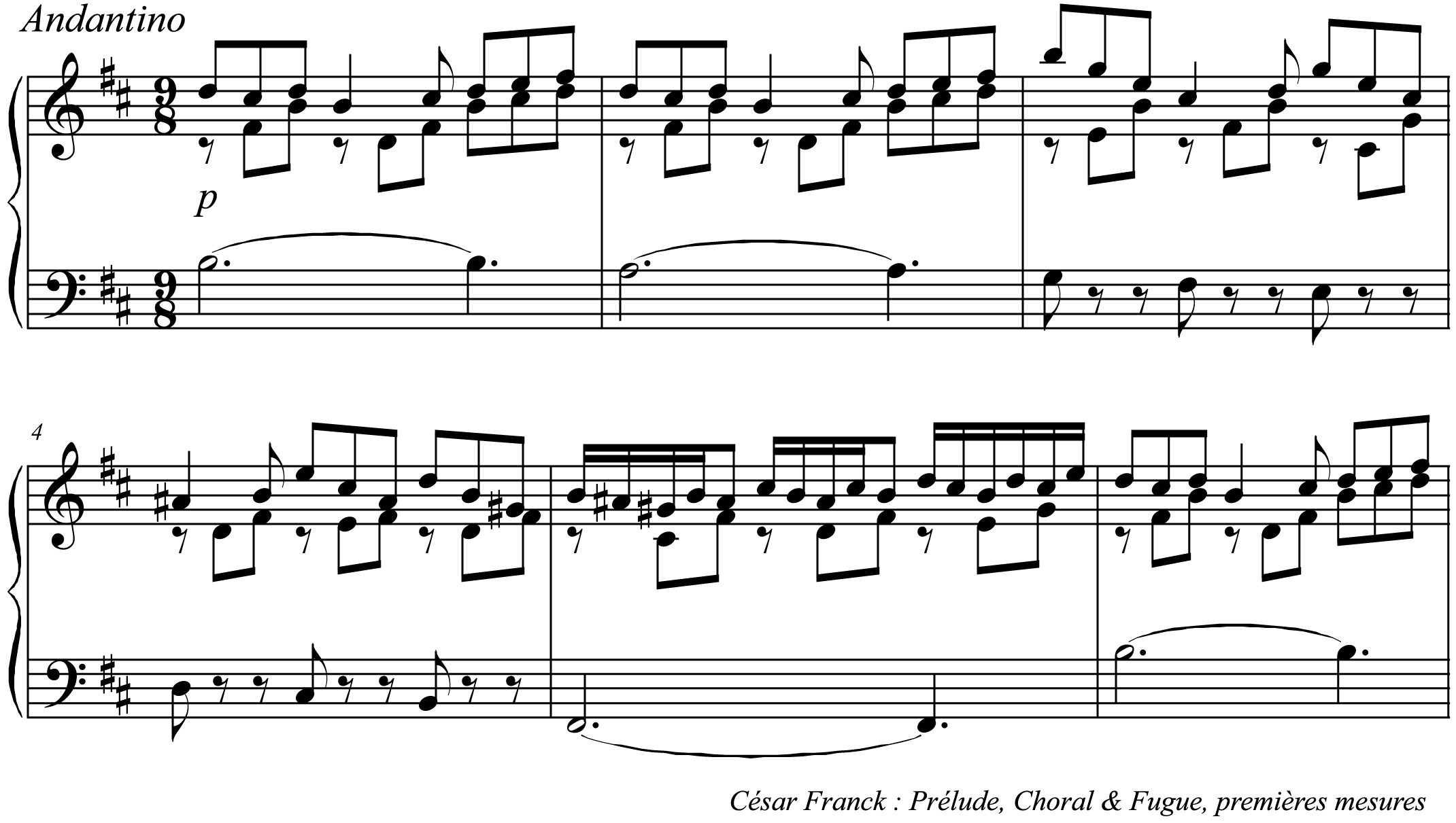 Extrait de partition de l'Opus 18 de Franck : Andantino